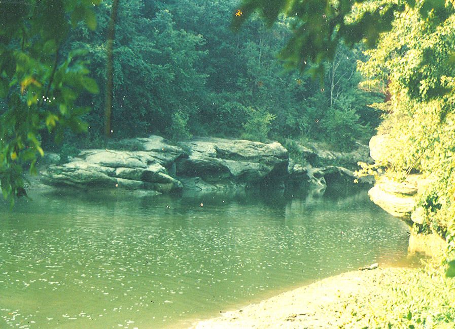 Turkey Run, Turkey Run State Park, Indiana, 9-1992